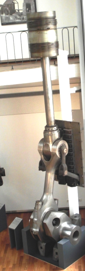 Blick auf das im MAN Werksmuseum ausgestellte Triebwerk des doppeltwirkenden Kreuzkopf-Dieselmotors von MAN für die Schlachtschiffe der H-Klasse